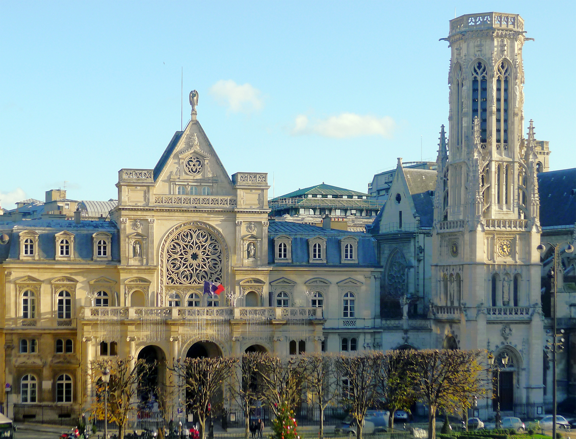 Mairie du 1er arrondissement - Paris